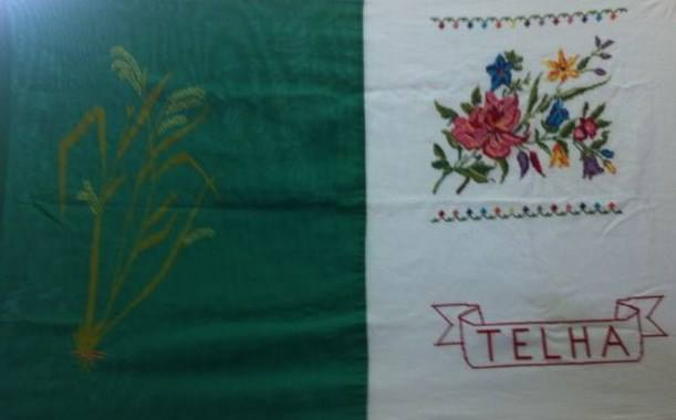 Bandeira Municipal de Telha-SE